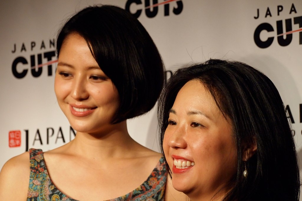 Masami Nagasawa @ Japan Cuts 2012